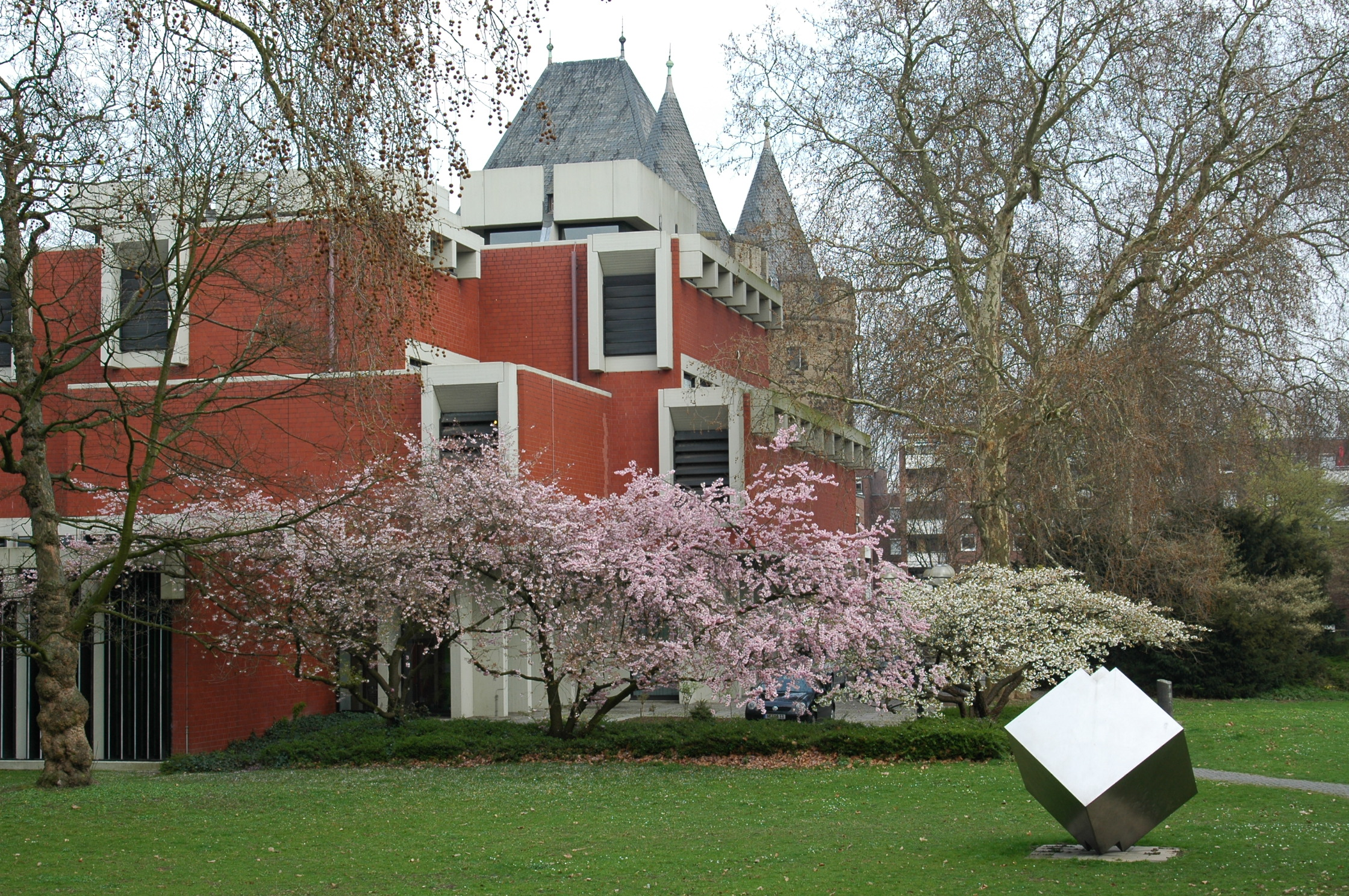 Clemens-Sels-Museum und Obertor mit Skulptur "Würfel" (1985) von Josef Neuhaus